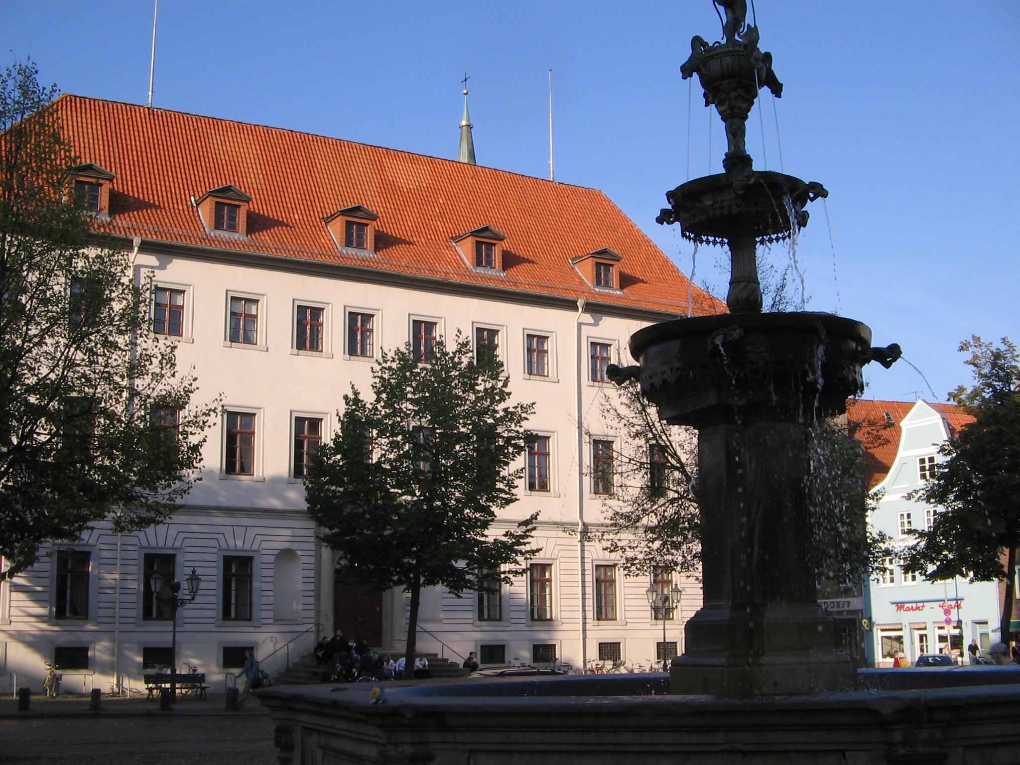 Lüneburger Stadtschloss (heute Landgericht) am Markt. Im Vordergrund der Luna-Brunnen.